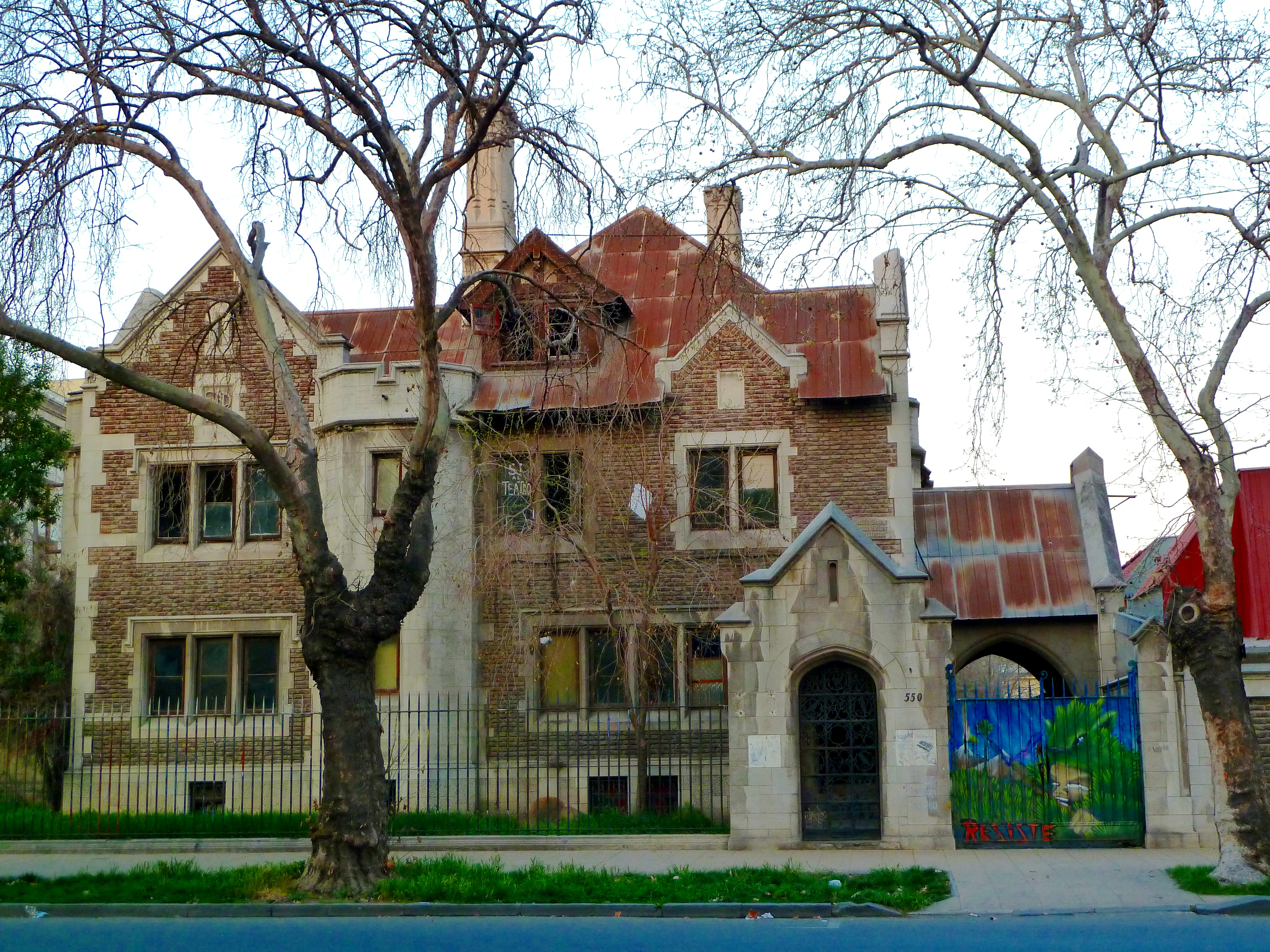 Casonas de Avenida República This is a photo of a national monument in Chile: 415